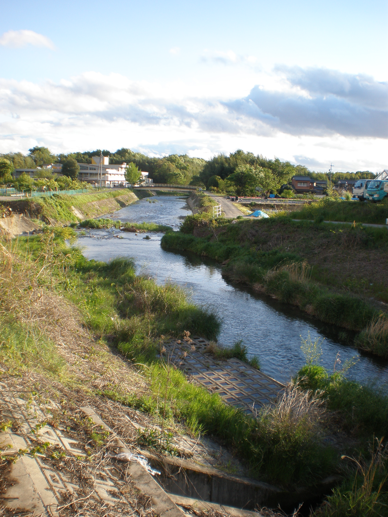 内津川（撮影場所：愛知県春日井市神屋町）